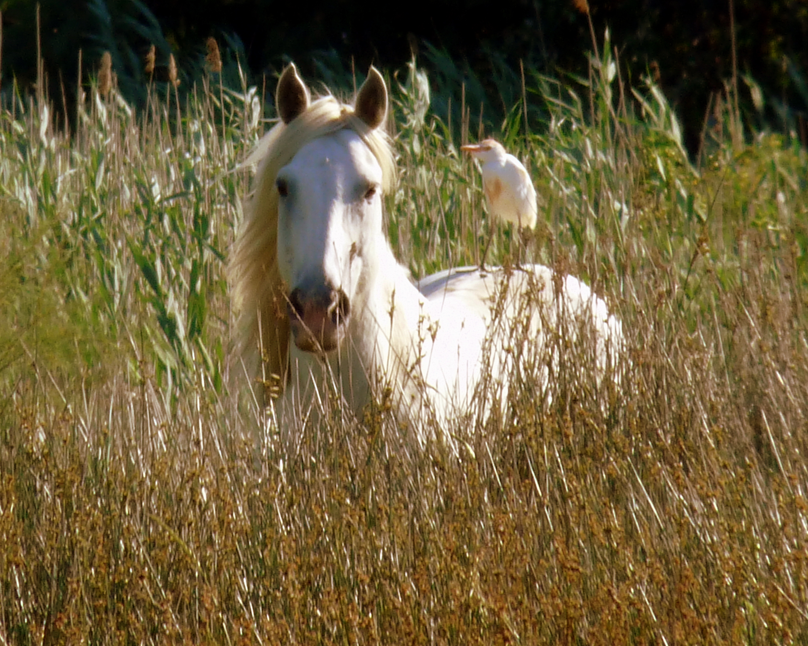 Saintes Maries de la Mer